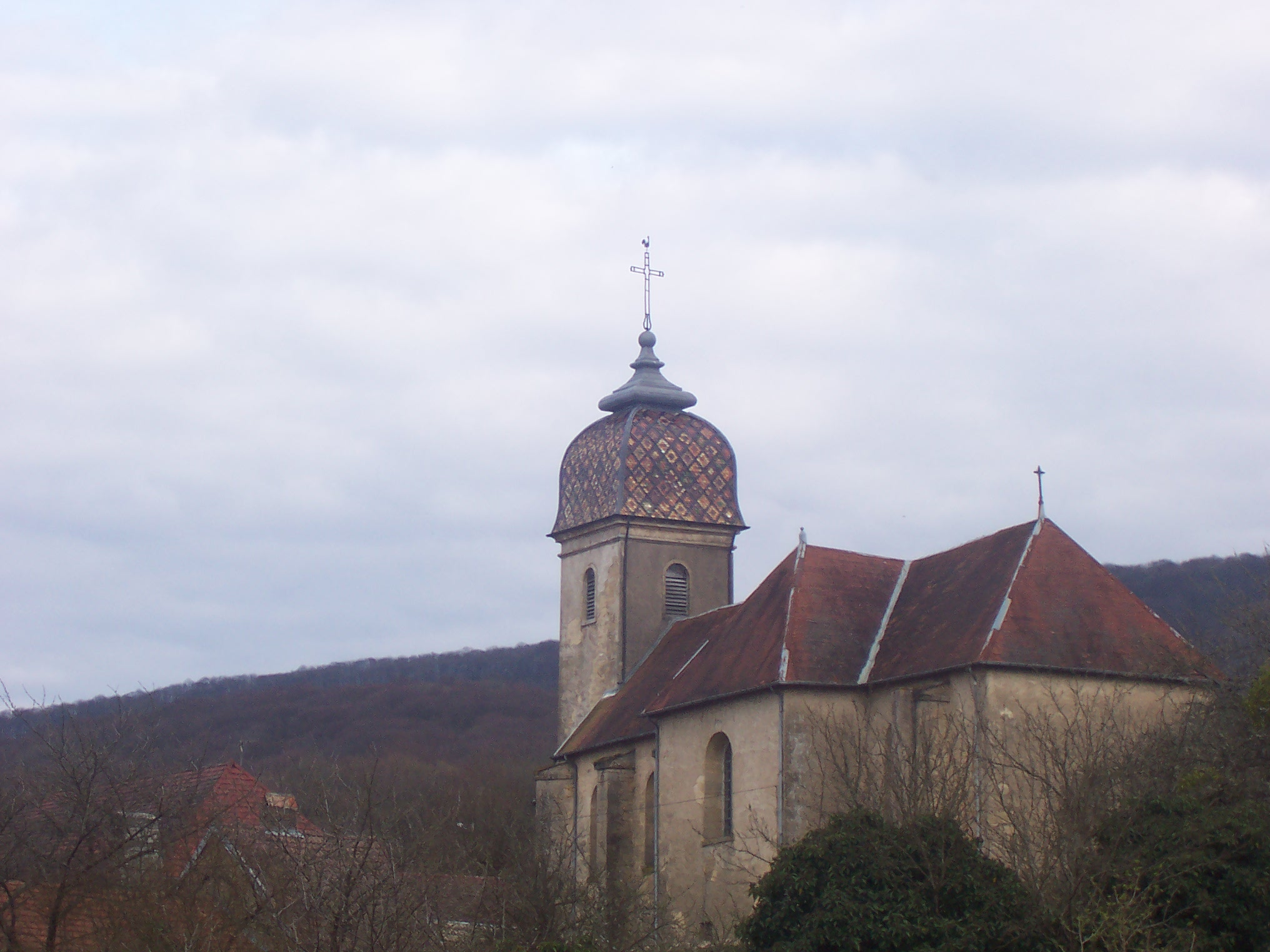 Kirche Saint-Léger in Vieilley